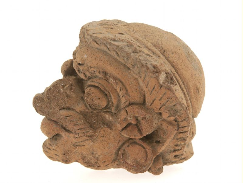 Beeld. Alle huizen en paleizen werden gebouwd van vergankelijk materiaal en moesten beschermd worden tegen termieten en verval door het te bedekken met een laag terracotta. De meeste terracotta's hebben hun oorsprong in Trawulan, waar ooit de belangrijkste stad van het Majapahit-rijk was gelegen. Het hoofdje stelt waarschijnlijk Togog, een opvallend misvormde bediende (panakawan) voor, die voorkomt in Javaanse verhalen en drama's.. Terracotta hoofd